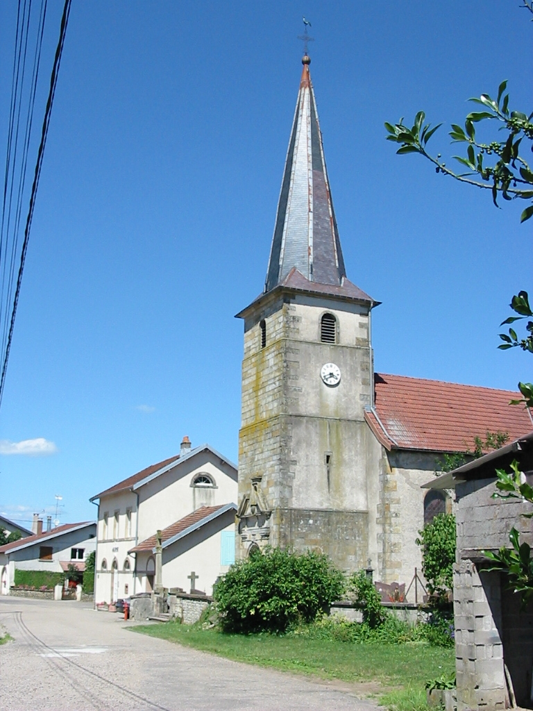 Vaudéville Église Saint-Quirin (1725) Commune du canton d'Épinal-Est (Vosges) Photo personnelle du 10 juillet 2006. Copyright © Christian Amet